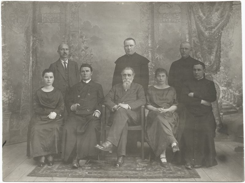 Lietuvių draugijos nukentėjusiems dėl karo šelpti centro komitetas. Sėdi, iš kairės: Ona Žebrauskaitė, Juozas Stankevičius, Jonas Basanavičius, Veronika Alseikienė, Pranas Bieliauskas. Stovi, iš kairės: Jurgis Šlapelis, Petras Kraujalis ir Vladas Jezukevičius.